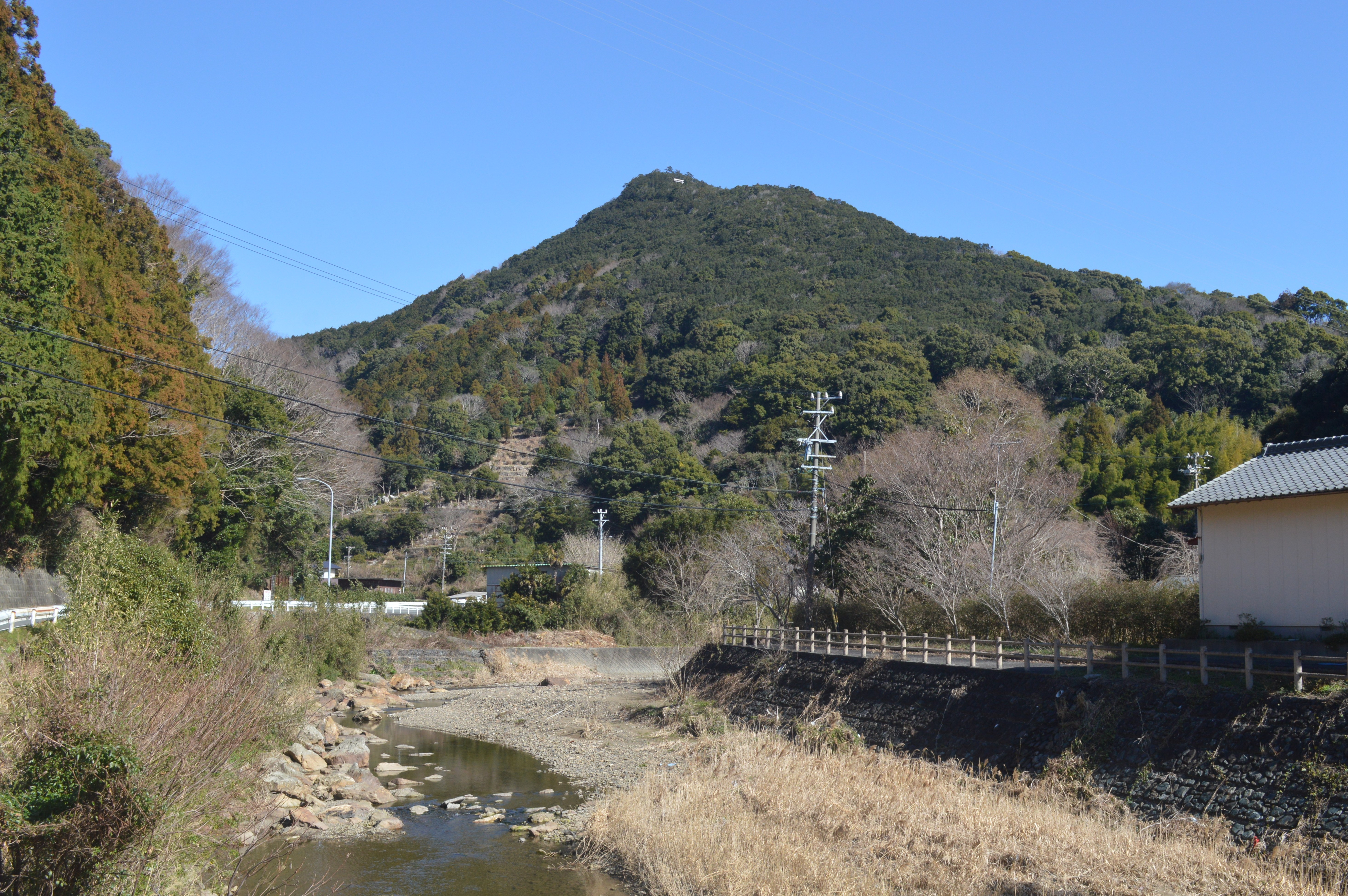 三重県度会郡南伊勢町を流れる五ヶ所川と五ヶ所浅間山（五ヶ所富士）。